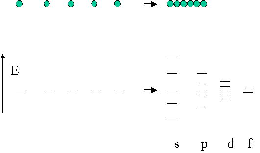 schematische dispersie gedrag van golffuncties bij condensatie